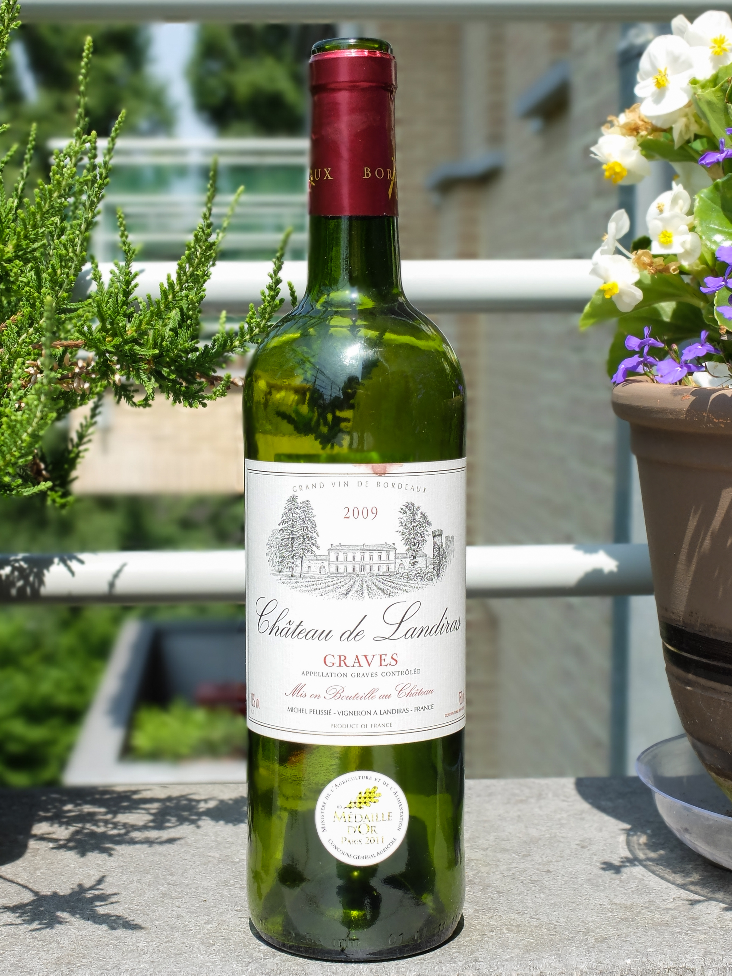 2009 Château De Landiras Graves